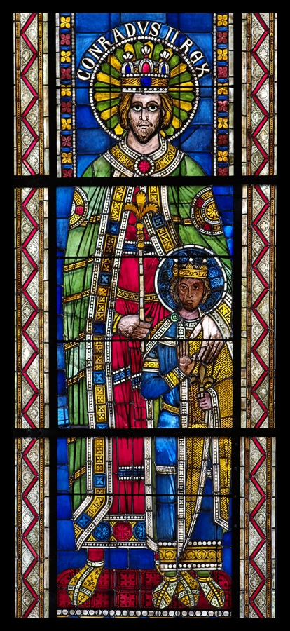 Le bas-côté nord, baie VI : Conradus Rex et un prince enfant (dernier tiers XIIe)